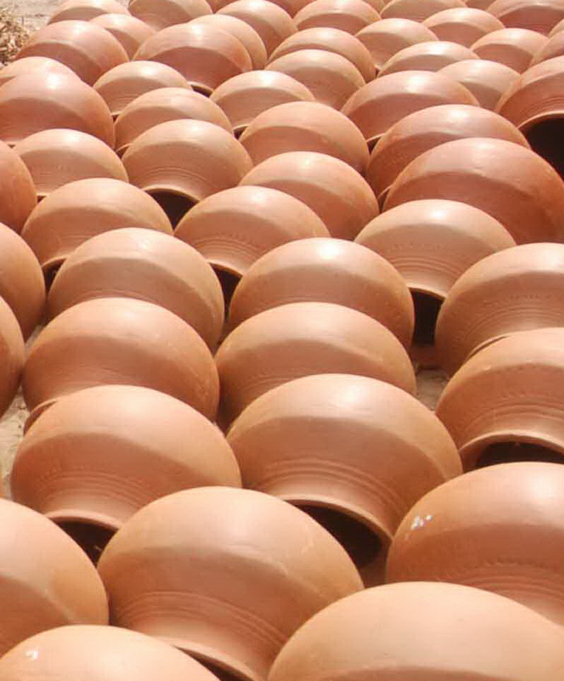 அடுக்கிவைக்கப் பட்டுள்ள மண்பானைகள், மதுரை